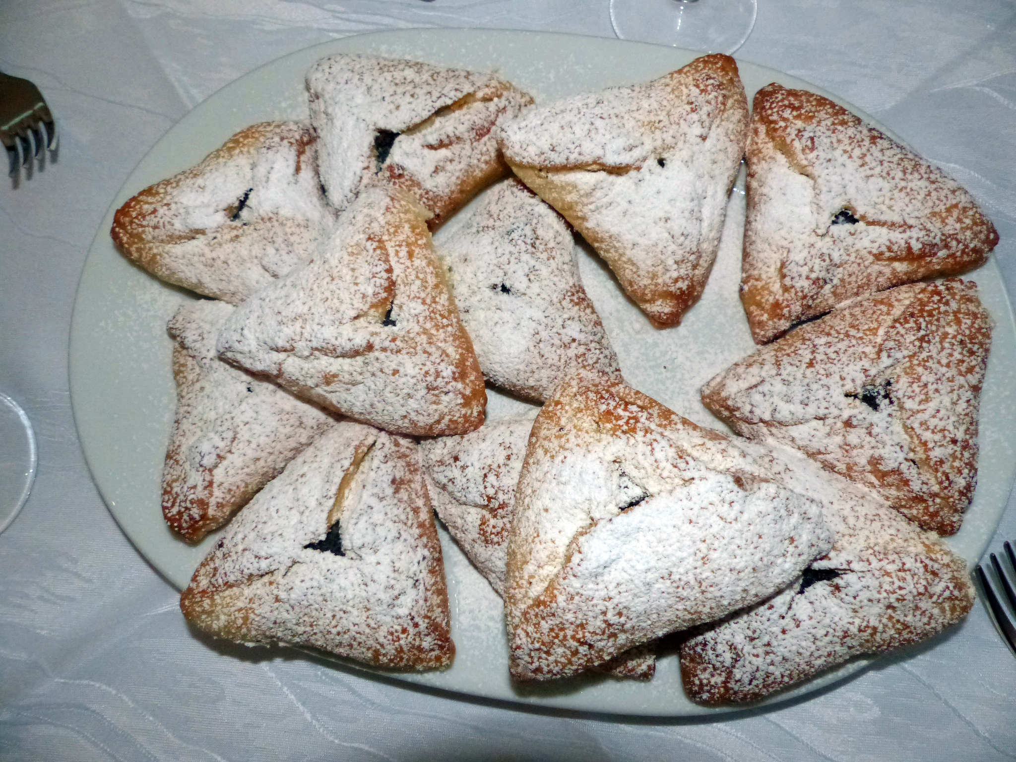 Hamantaschen zum Purim-Fest 2016 in Dresden